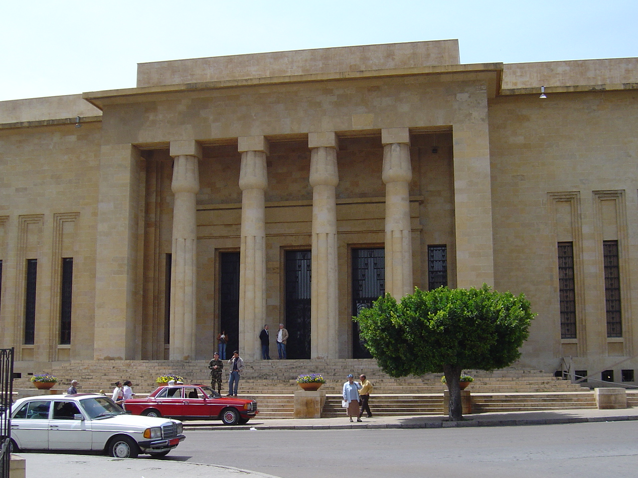 Το Εθνικό Μουσείο της Βηρυτού, Λίβανος